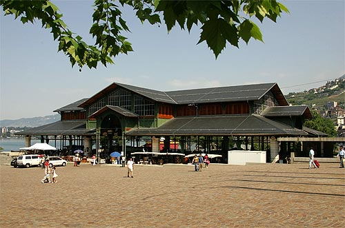 Montreux: Place du Marché avec le Marché Couvert